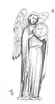 Statue d'ange de la porte nord de la cathédrale de Bordeaux (XIIIe siècle). Issu du Dictionnaire raisonné de l'architecture française du XIe au XVIe siècle, par Eugène Viollet-Le-Duc, 1856.